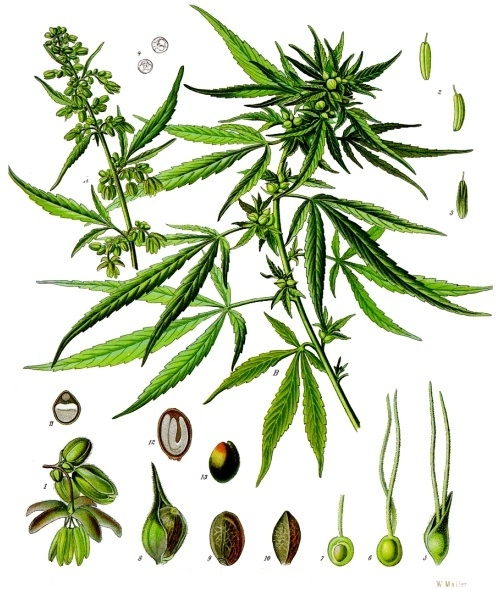 Hanfpflanze. A blühende männliche und B fruchtende weibliche Pflanze in natürl. Grösse; 1 männliche Blüthe, vergrössert; 2 und 3 Staubbeutel von verschiedenen Seiten, desgl.; 4 Pollenkorn, desgl.; 5 weibliche Blüthe mit Schutzblatt, desgl.; 6 dieselbe ohne Schutzblatt, desgl.; 7 Fruchtknoten im Längsschnitt, desgl.; 8 Frucht mit Schutzblatt, desgl.; 9 dieselbe ohne Schutzblatt, desgl.; 10 Same, desgl.; 11 derselbe im Querschnitt, desgl.; 12 derselbe im Längsschnitt, desgl.; 13 Same ohne Samenschale, desgl.